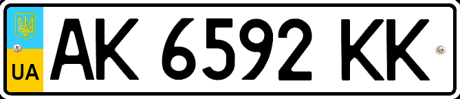 Номерной знак автомобилей, автобусов и прицепов Украины, стандарт 2004 года